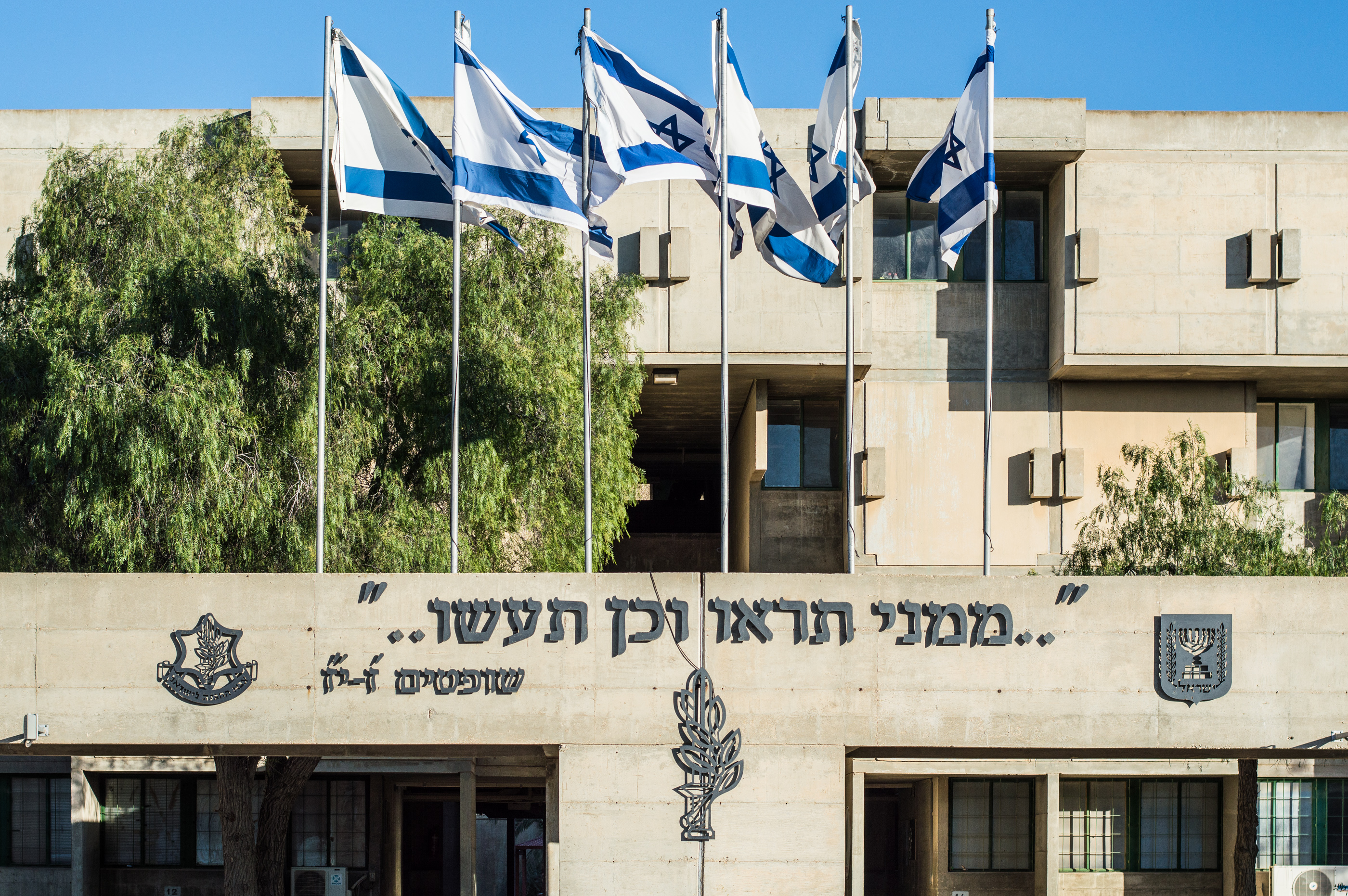 "מִמֶּנִּי תִרְאוּ וְכֵן תַּעֲשׂוּ" (שופטים ז', י"ז), אימרתו של גדעון כמוטו של בית הספר לקצינים